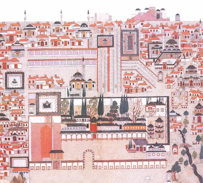 Manisa, Sitz osmanischer Statthalter des Sandschak Ṣaruḫān, osmanische Miniatur aus Şemāʾil-nāme-ʾi Āl-i ʿOs̲mān von Talikizâde